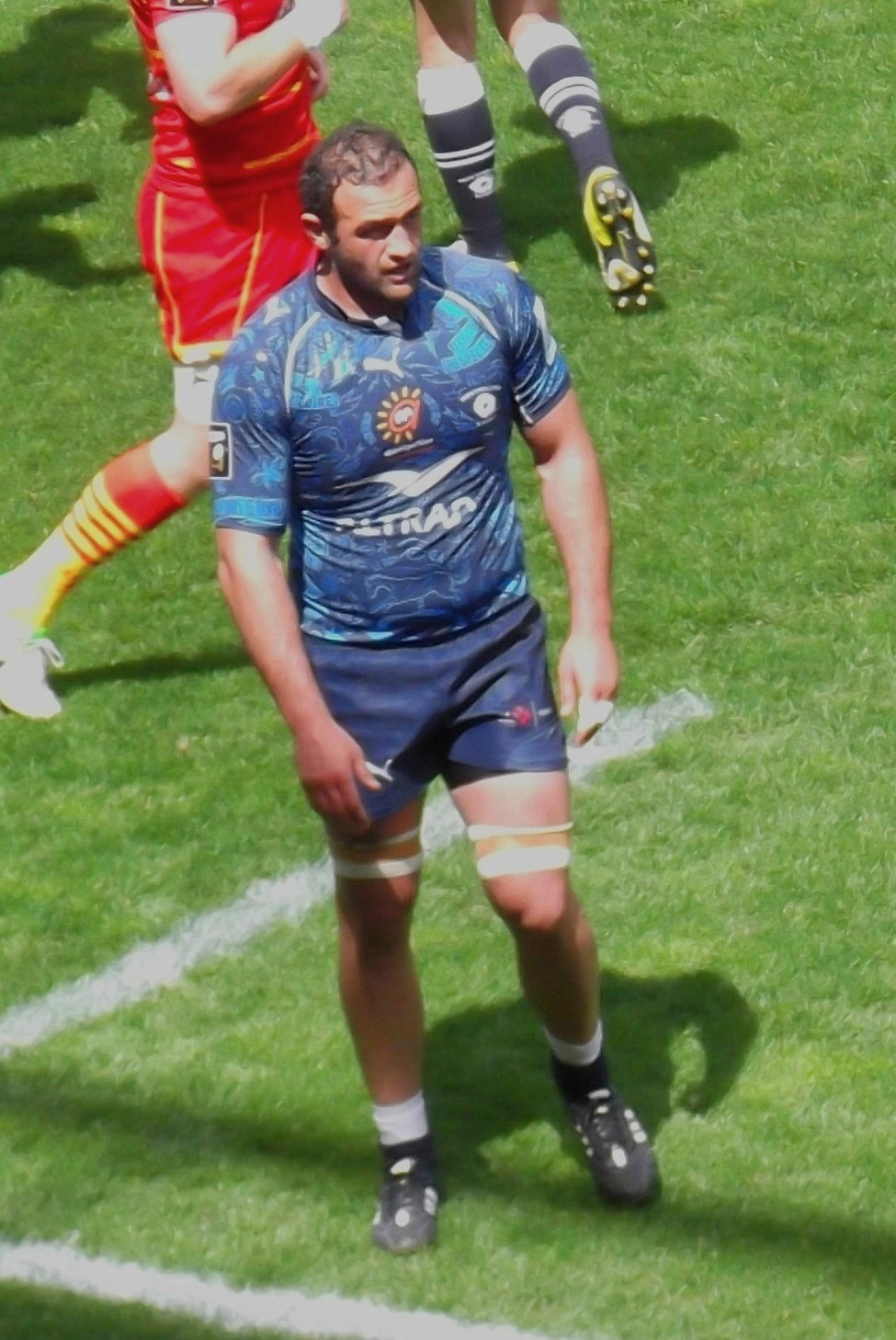 Mamuka Gorgodze, MHR vs USAP, mai 2013.